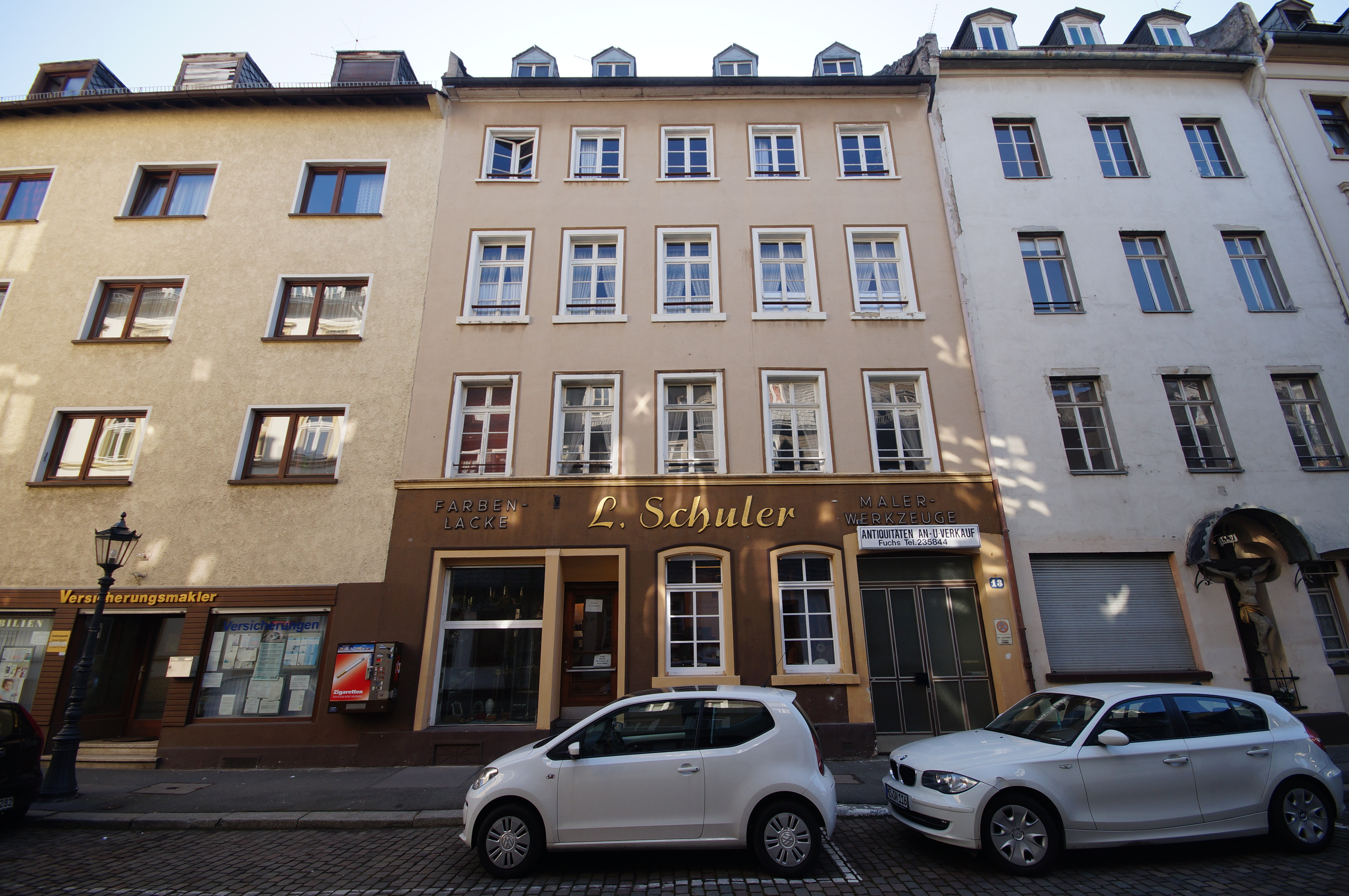 Die Fassade des Hauses Kapuzinerstraße 13 in Mainz-Altstadt